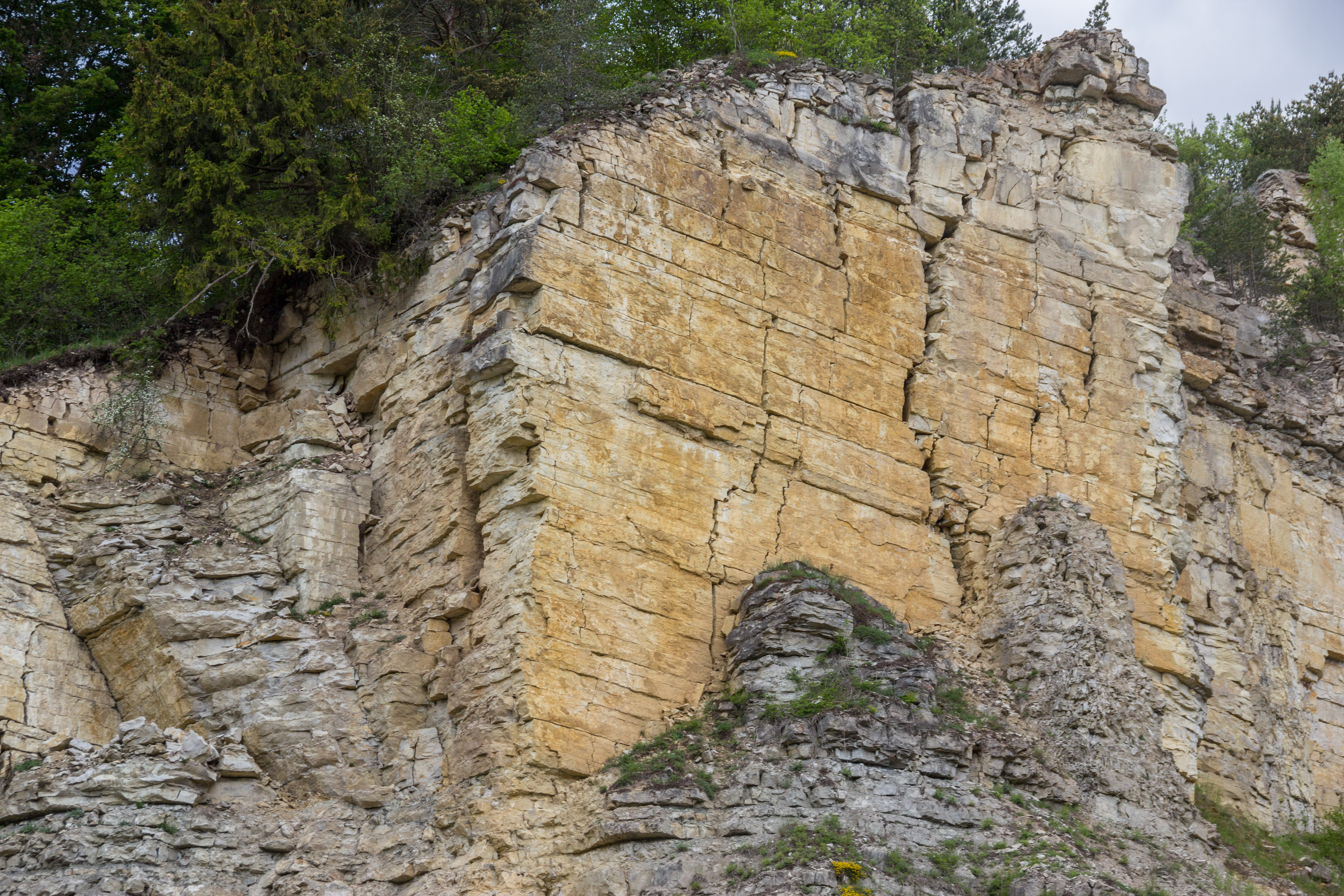 Steinbruch, Geotop, Arzberg, Beilngries